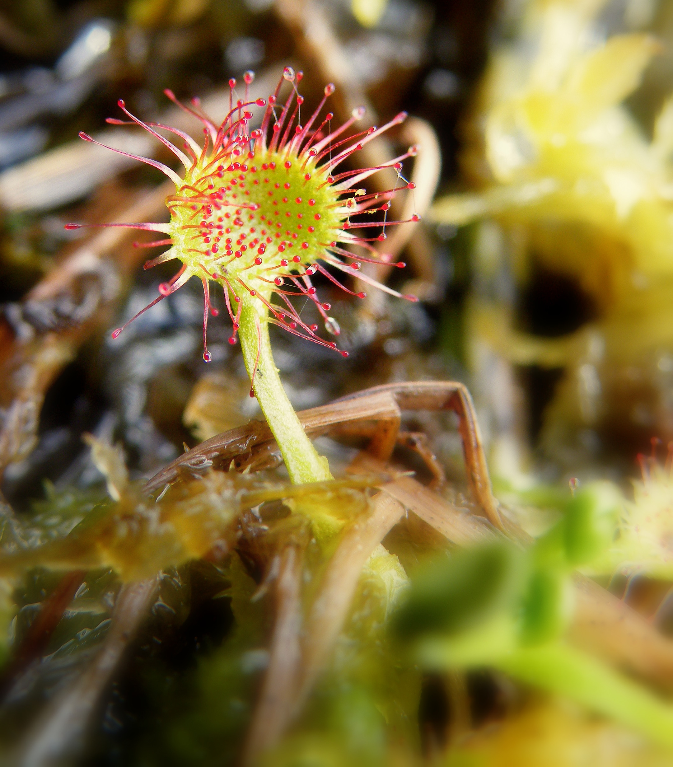 Српски (ћирилица): Ово је фотографија заштићеног природног добра у Србији под шифром: ПИО23 This is a a photo of a natural area in Serbia with ID: ПИО23 Упркос уваженом мишљењу, људи најчешће замишљају да су ове биљке велике и опасне а оне су заправо веома мале, барем у Србији.